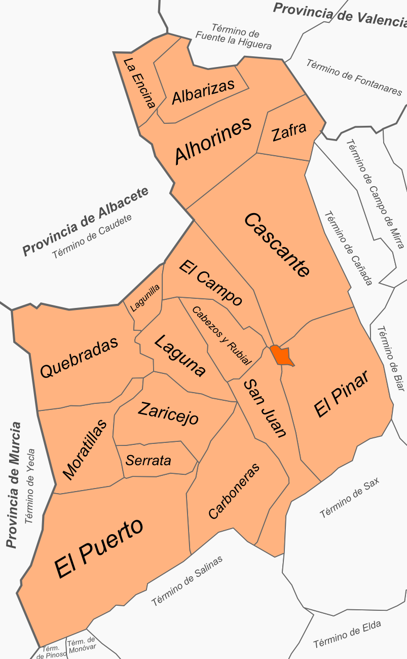 Plànol del terme de Villena segons les seues divisions en partides rurals abans de la guerra civil.